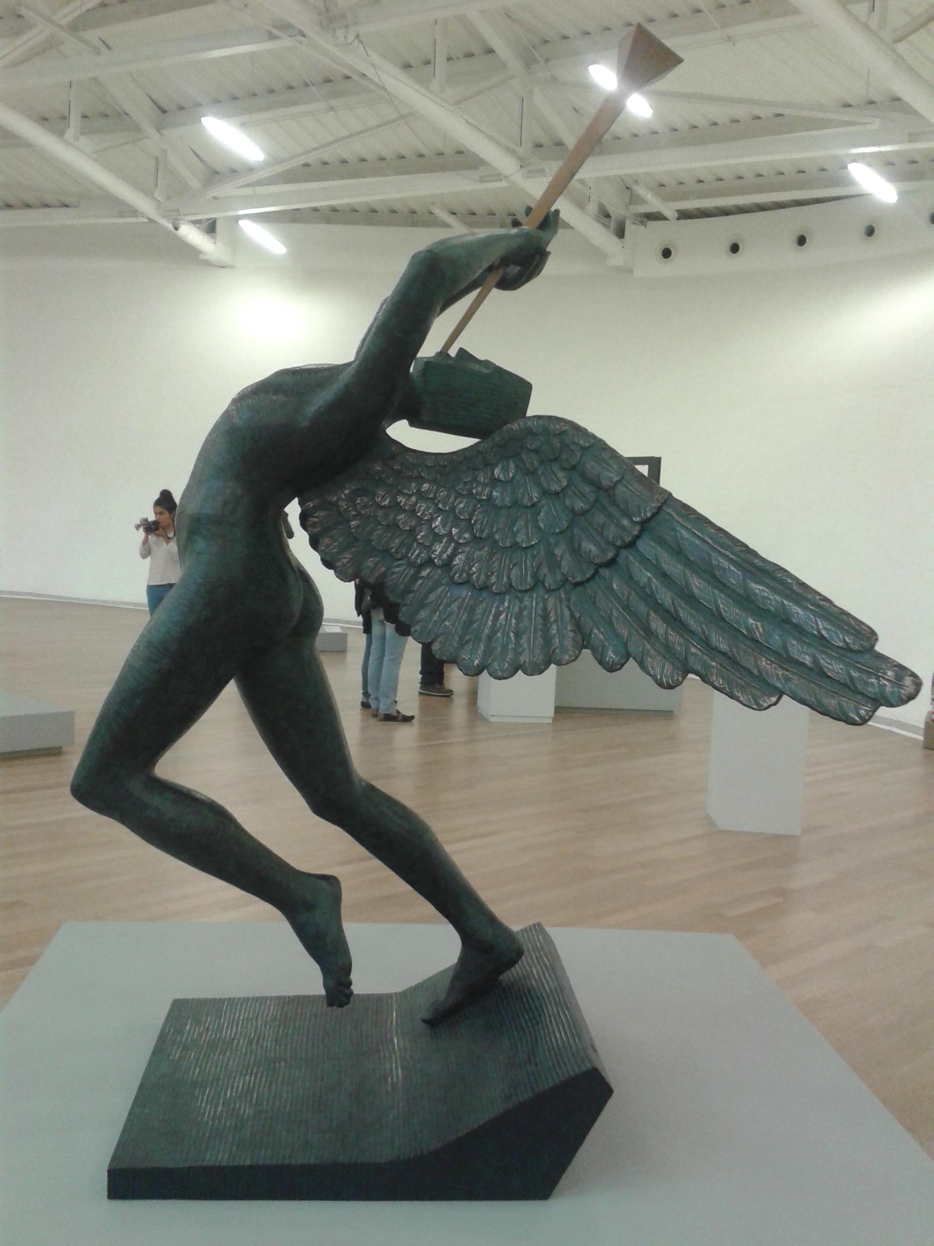 Escultura de Salvador Dalí de muestra en el Museo Soumaya en México, D.F.